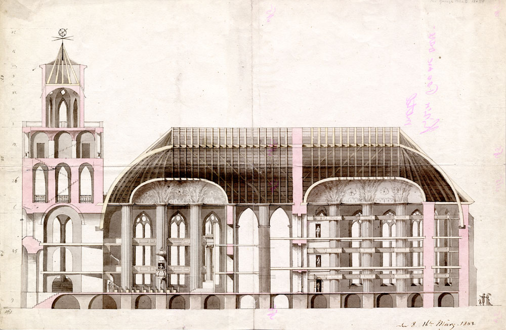 Tartu Toomkiriku ümberehitamise projekt, ristlõige